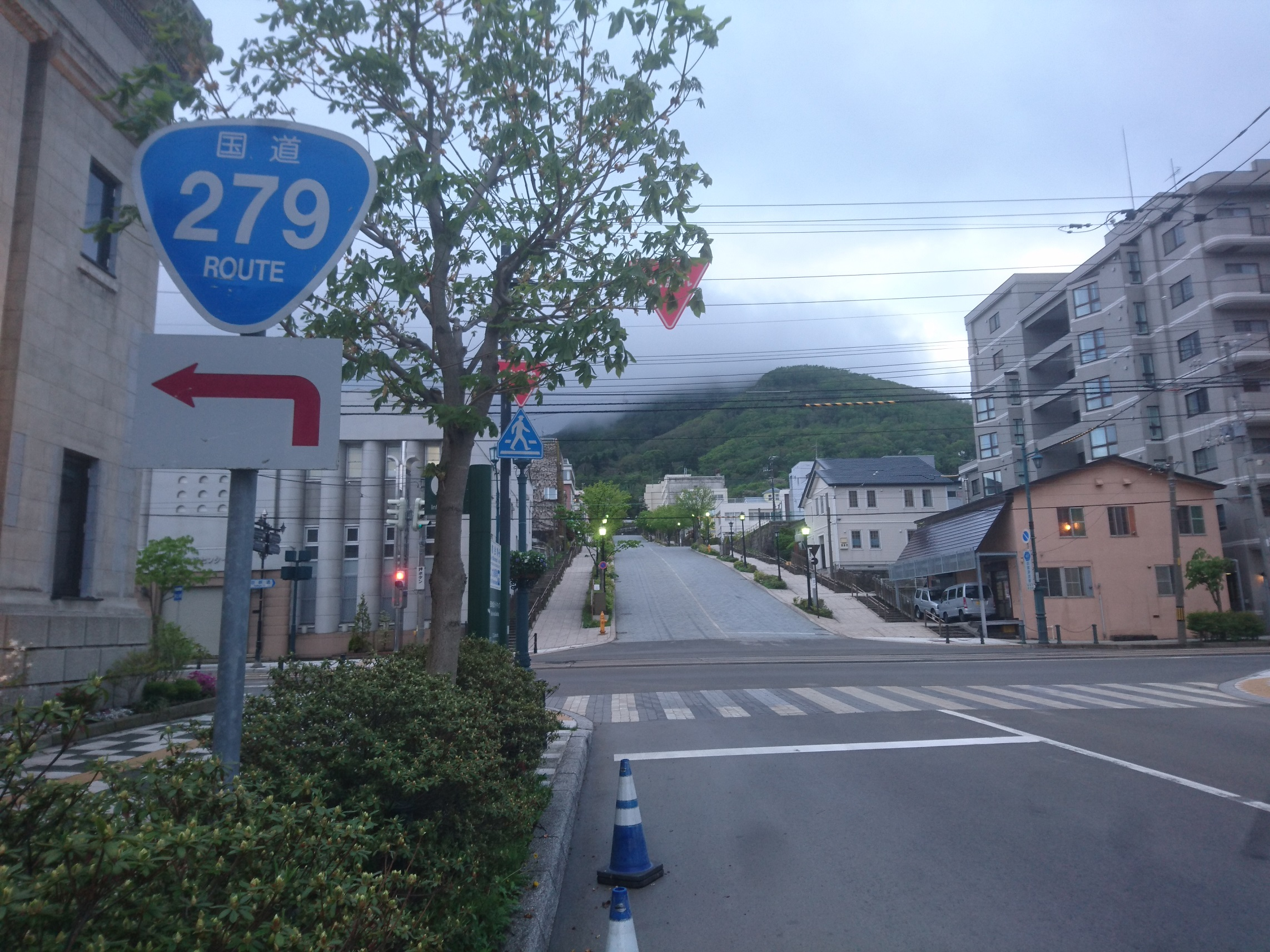 函館市末広町付近の国道279号。